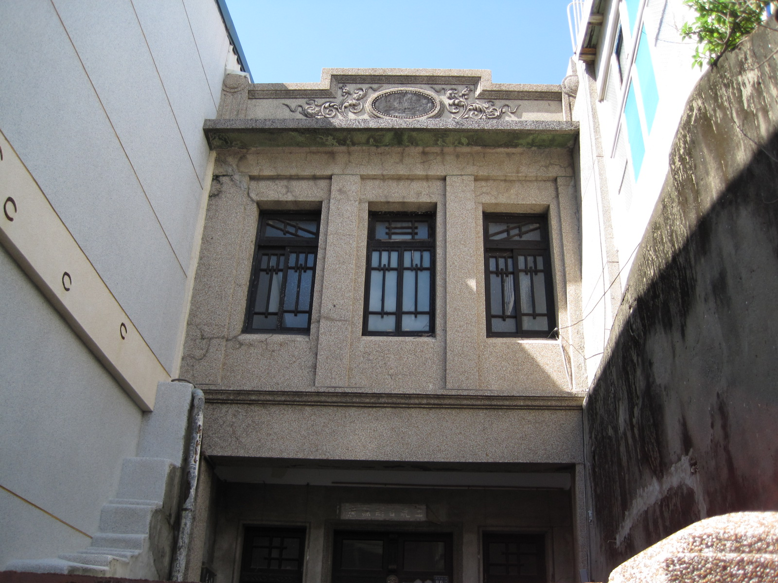 臺南安平市仔街何旺厝